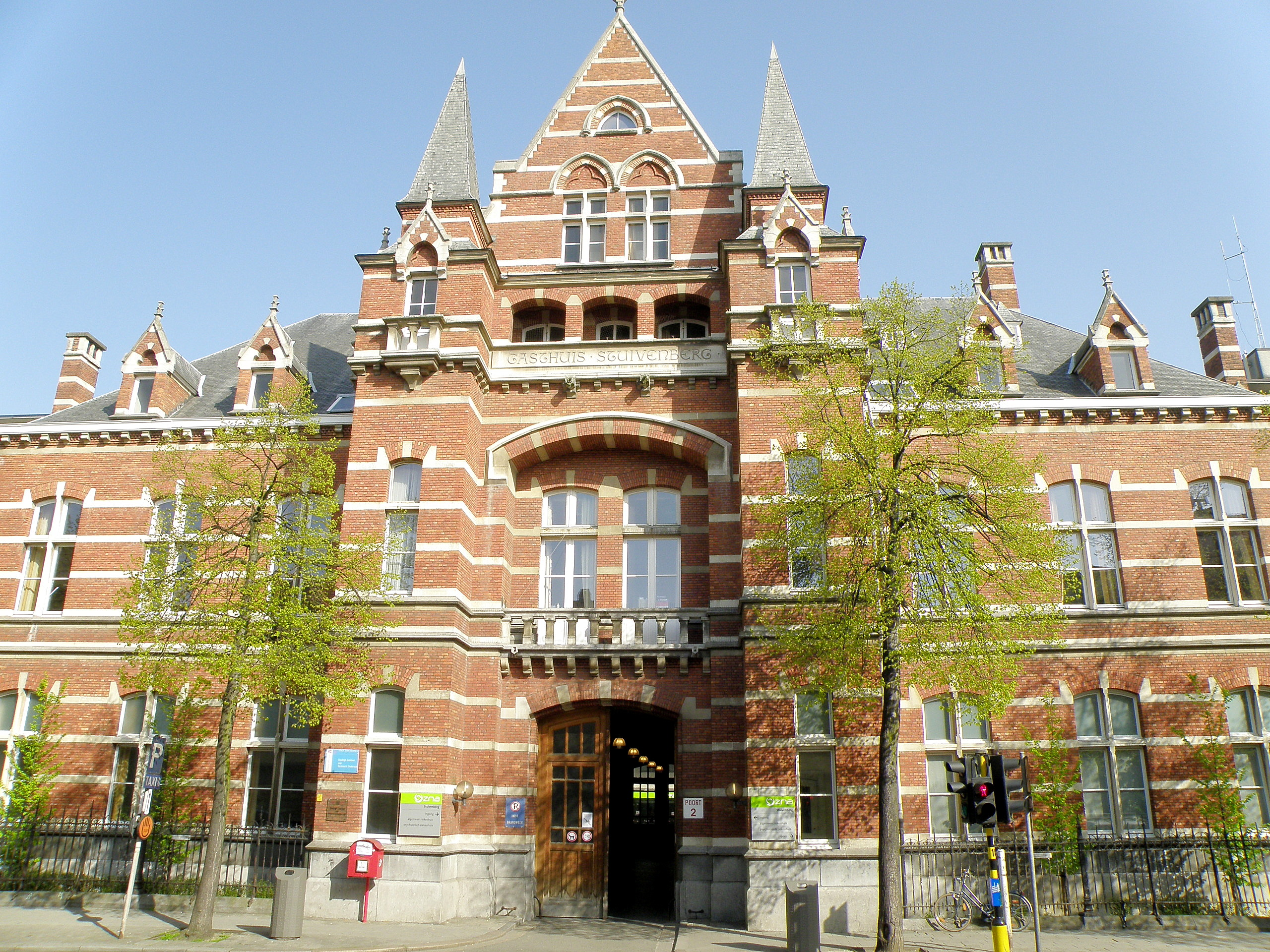 Antwerpen, district Antwerpen. Stuivenbergziekenhuis, voorbouw aan de Lange Beeldekensstraat. Ontwerp van Jules Bilmeyer en Jozef Van Riel (1884), eig. aanpassing van ontwerp van Frans Baeckelmans. Vgl. verder: Inventaris Bouwkundig Erfgoed